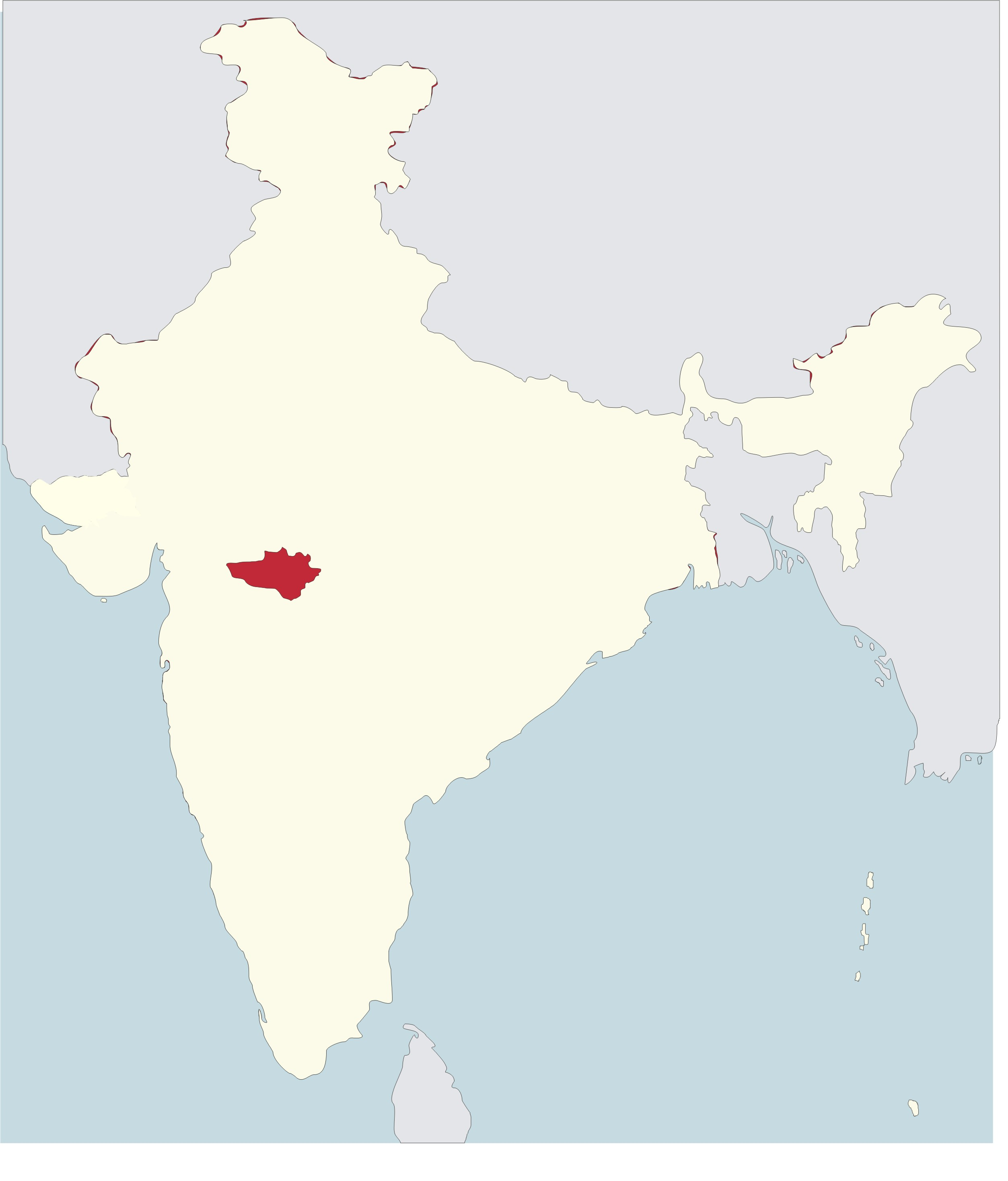 mapa del bisbtat de Khandwa a l'Índia